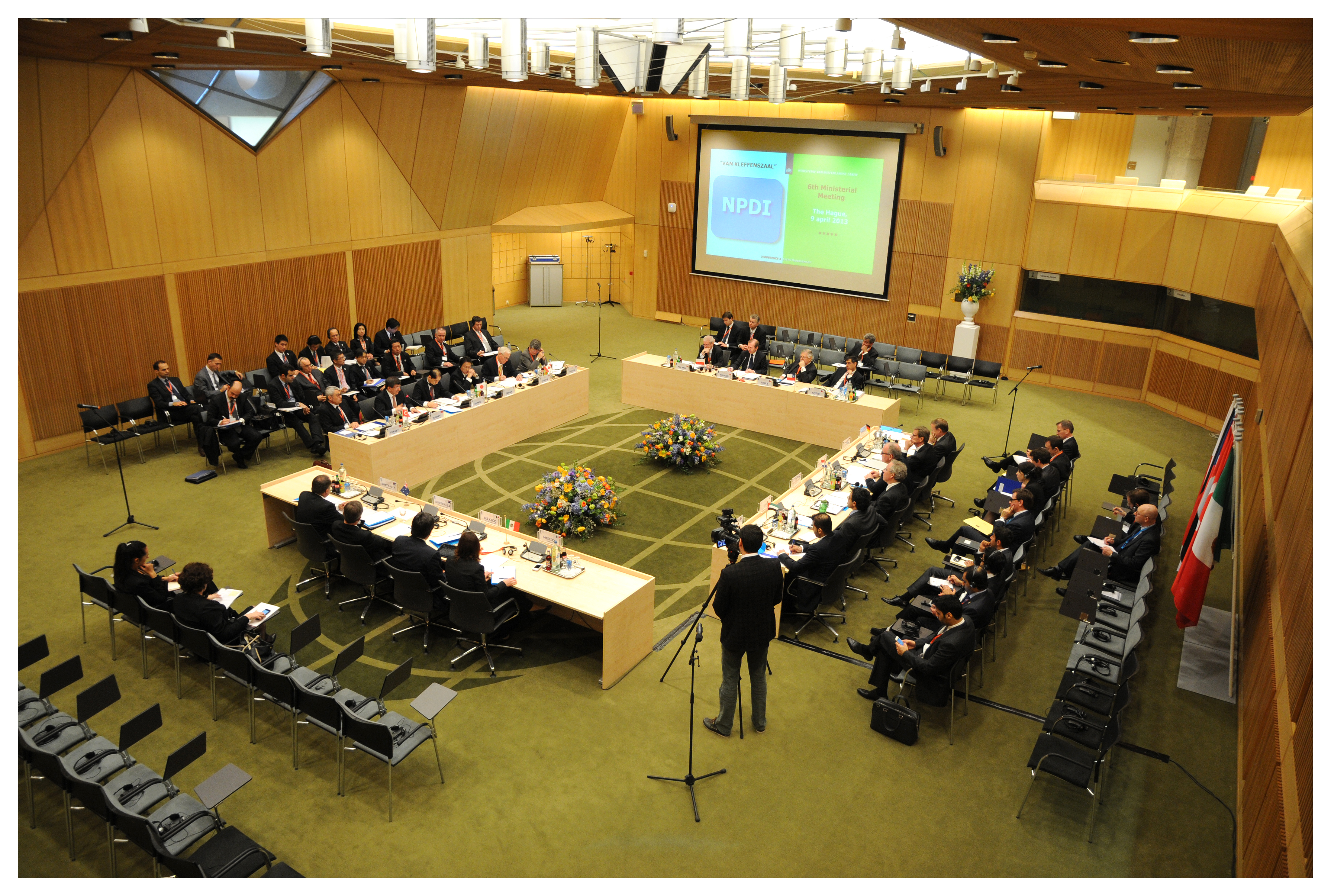 130409 NPDI op BZ 2117